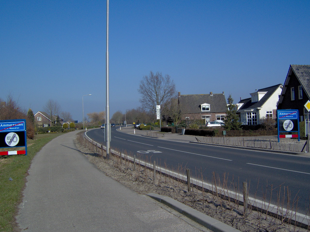 eigen foto